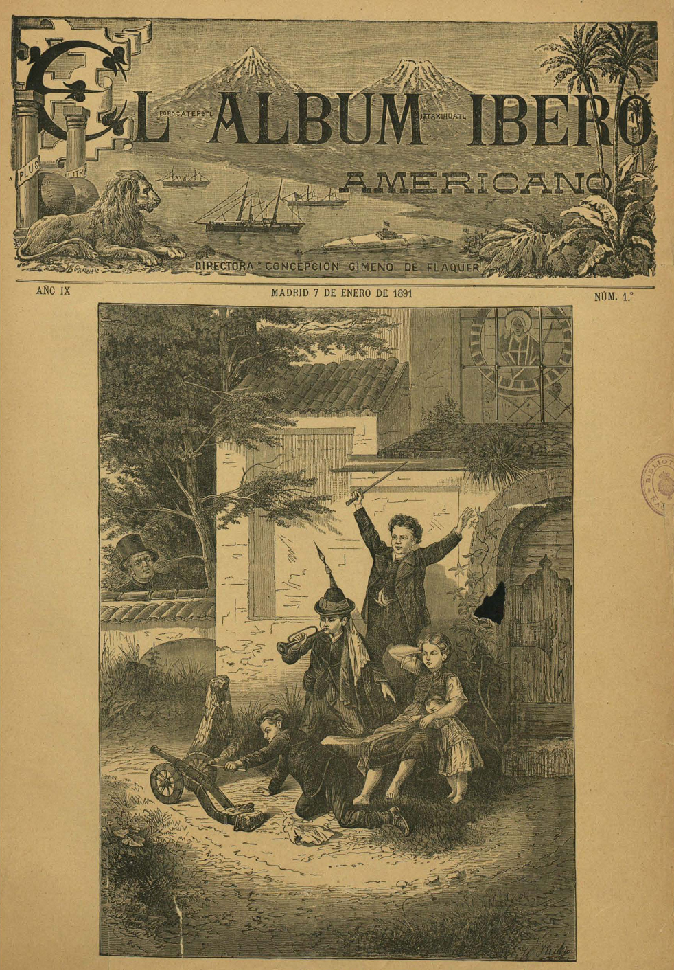 Portada de la revista El Álbum Ibero-Americano.